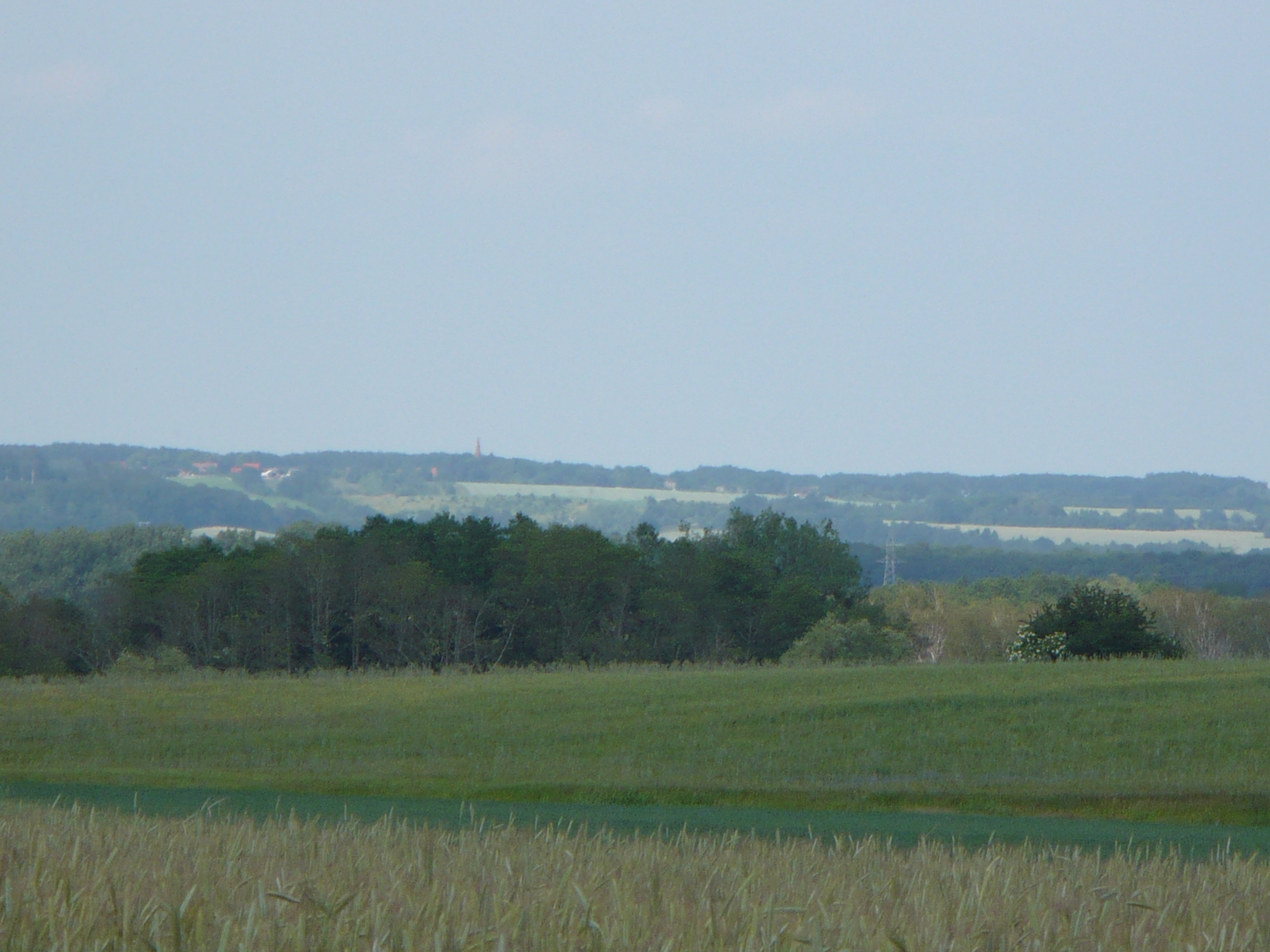 Polana Binowska i Polana Kołowska widziane z Równiny Wełtyńskiej (Gryfino, West Pomerania)